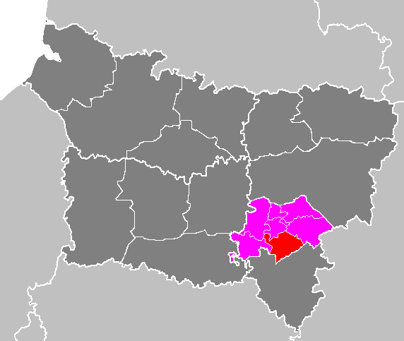 Maps of arrondissements and cantons of France: Arrondissement de Soissons - Canton d Oulchy-le-Château.PNG